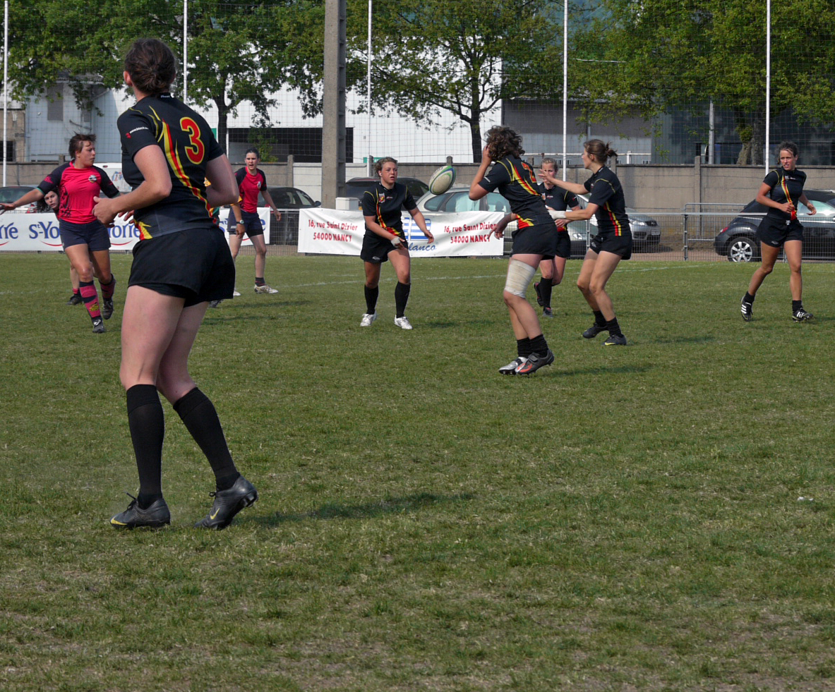 LORRAINE - BELGIQUE RUGBY Féminin à 7